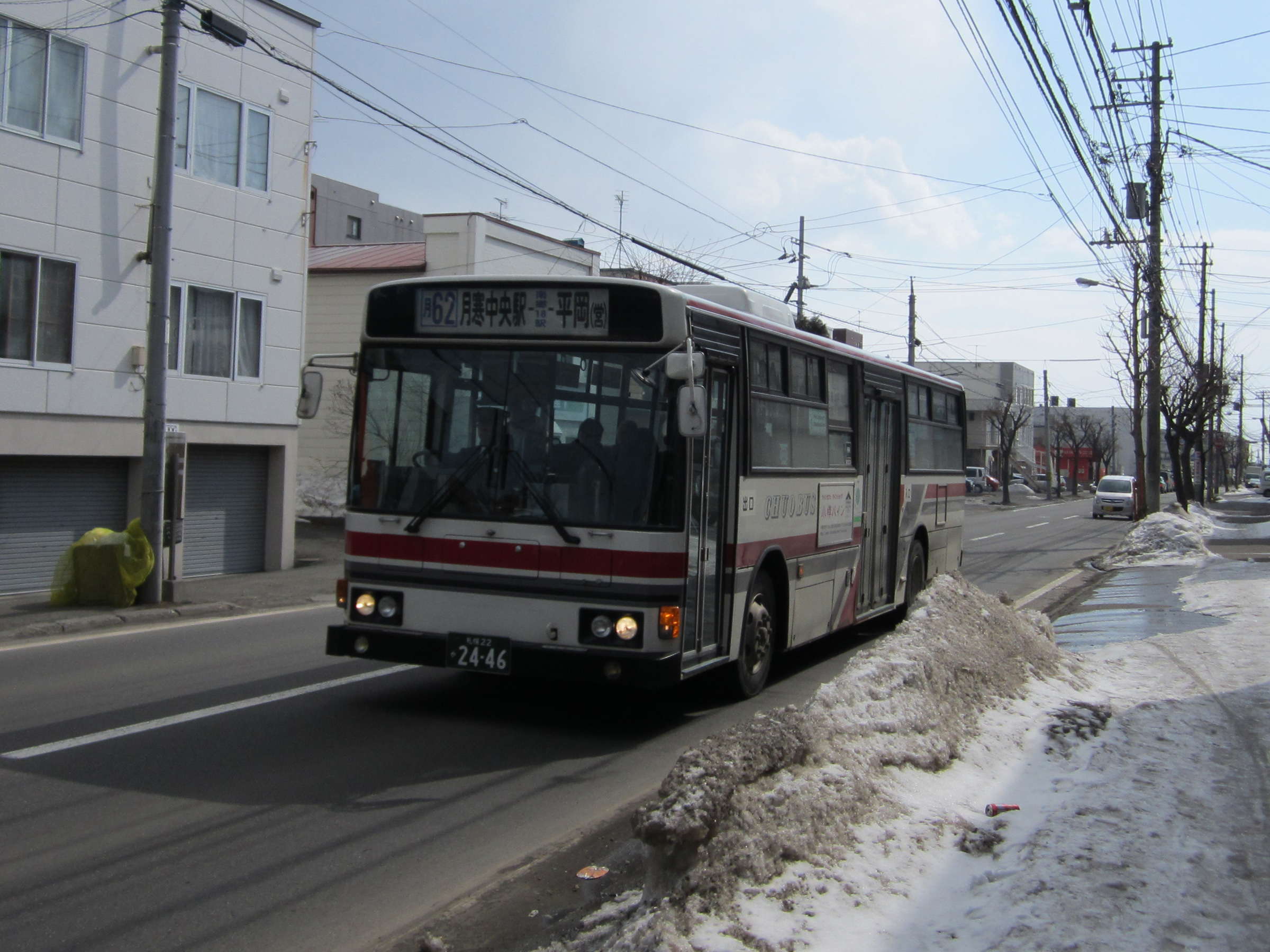 北海道中央バス 北野線[月62]